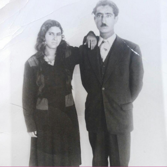 محمدخان ضرغامی و همسرش در جوانی، گذشت بیش از ۳۰ سال از تاریخ عرضه، آن را در مالکیت عمومی قرار داده‌است